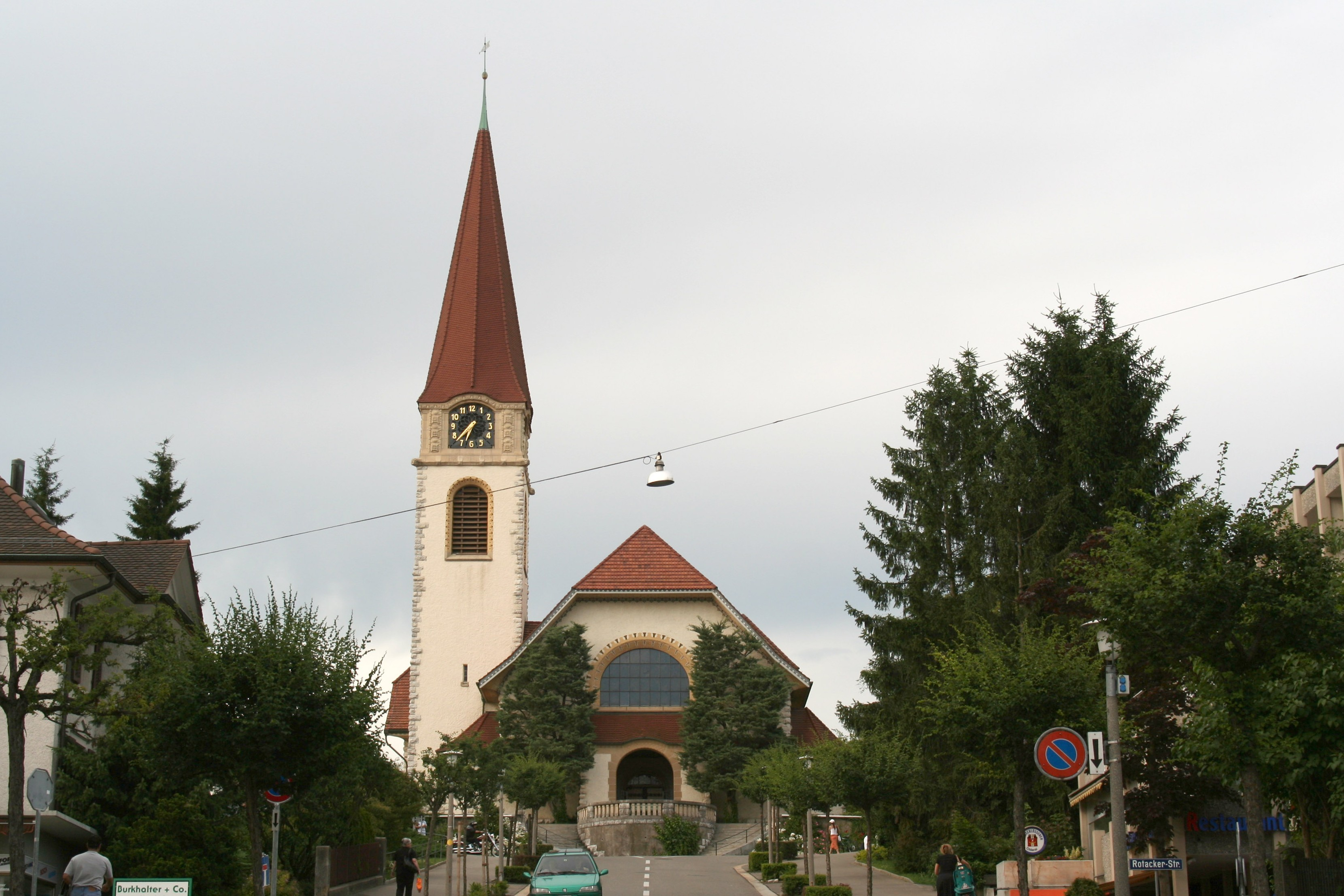 Reformierte Kirche Wallisellen, Standpunkt in der KirchstrasseDie Kirche im Jugendstil wurde 1907/1908 von den Architekten Robert Bischoff und Hermann Weideli gebaut. 1975 wurde sie, mittlerweile denkmalgeschützt, renoviert.